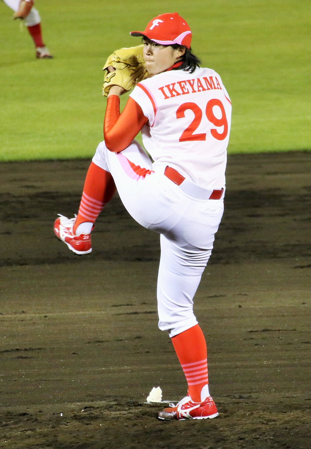 ウエスト・フローラ投手の池山あゆ美。わかさスタジアム京都にて。